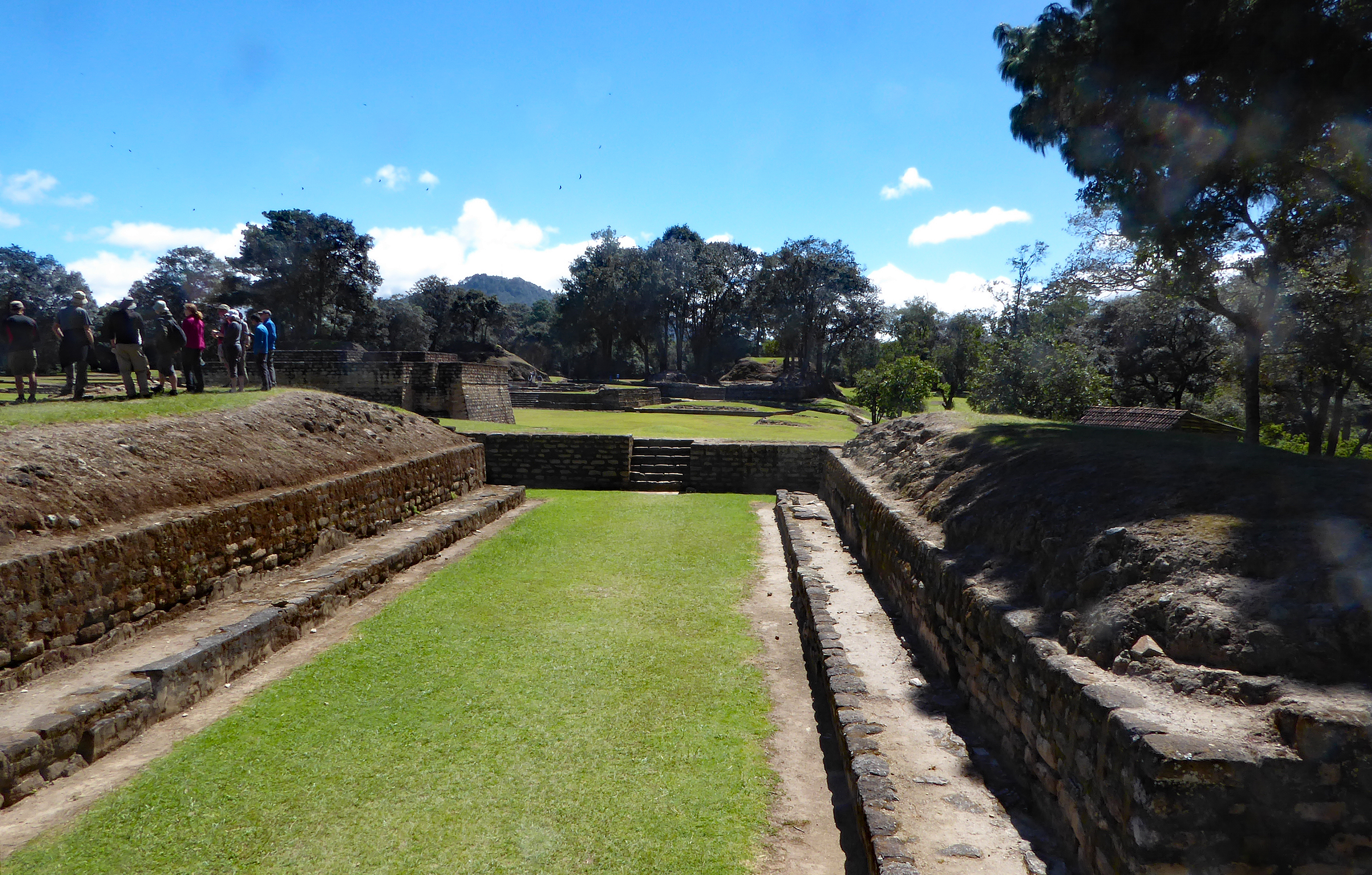 Iximché ballcourt